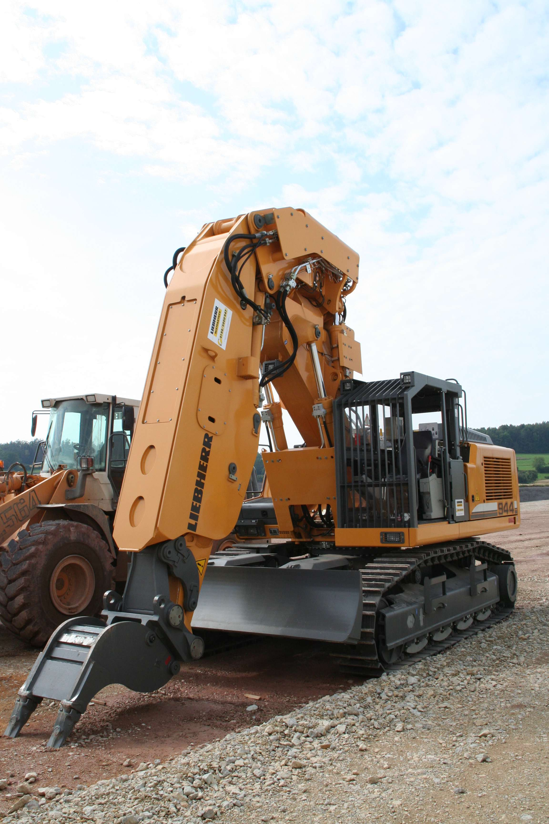 Tunnelbagger Liebherr 944, Tunnel Reitersberg